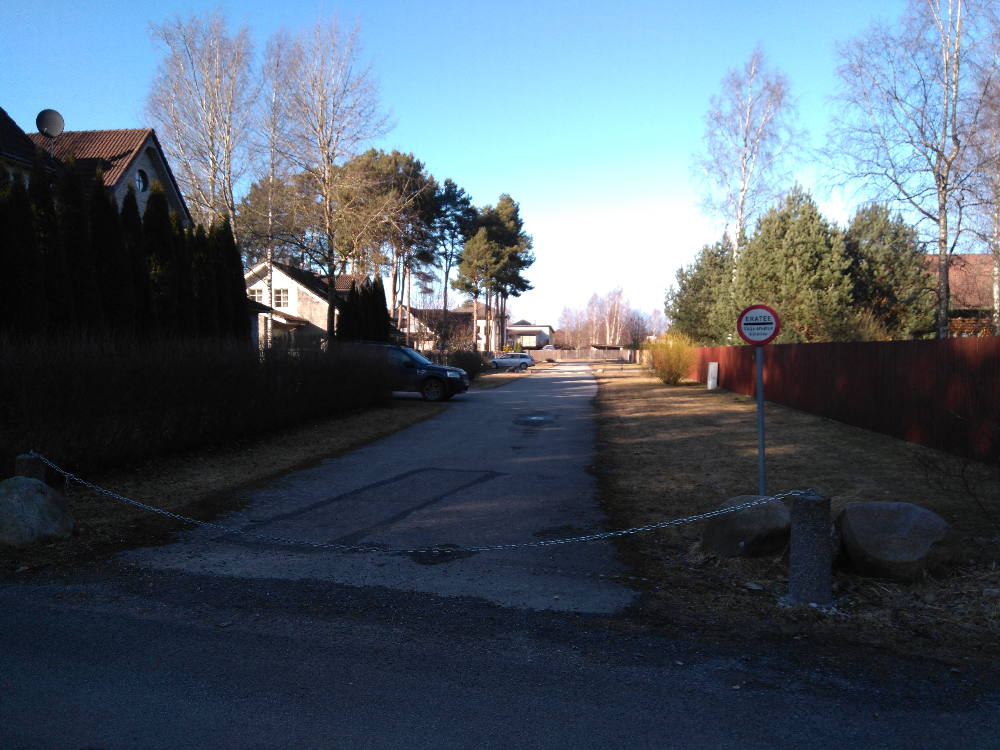 Tedrepere tänav